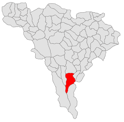 Categorie:Hărţi ale judeţului Alba